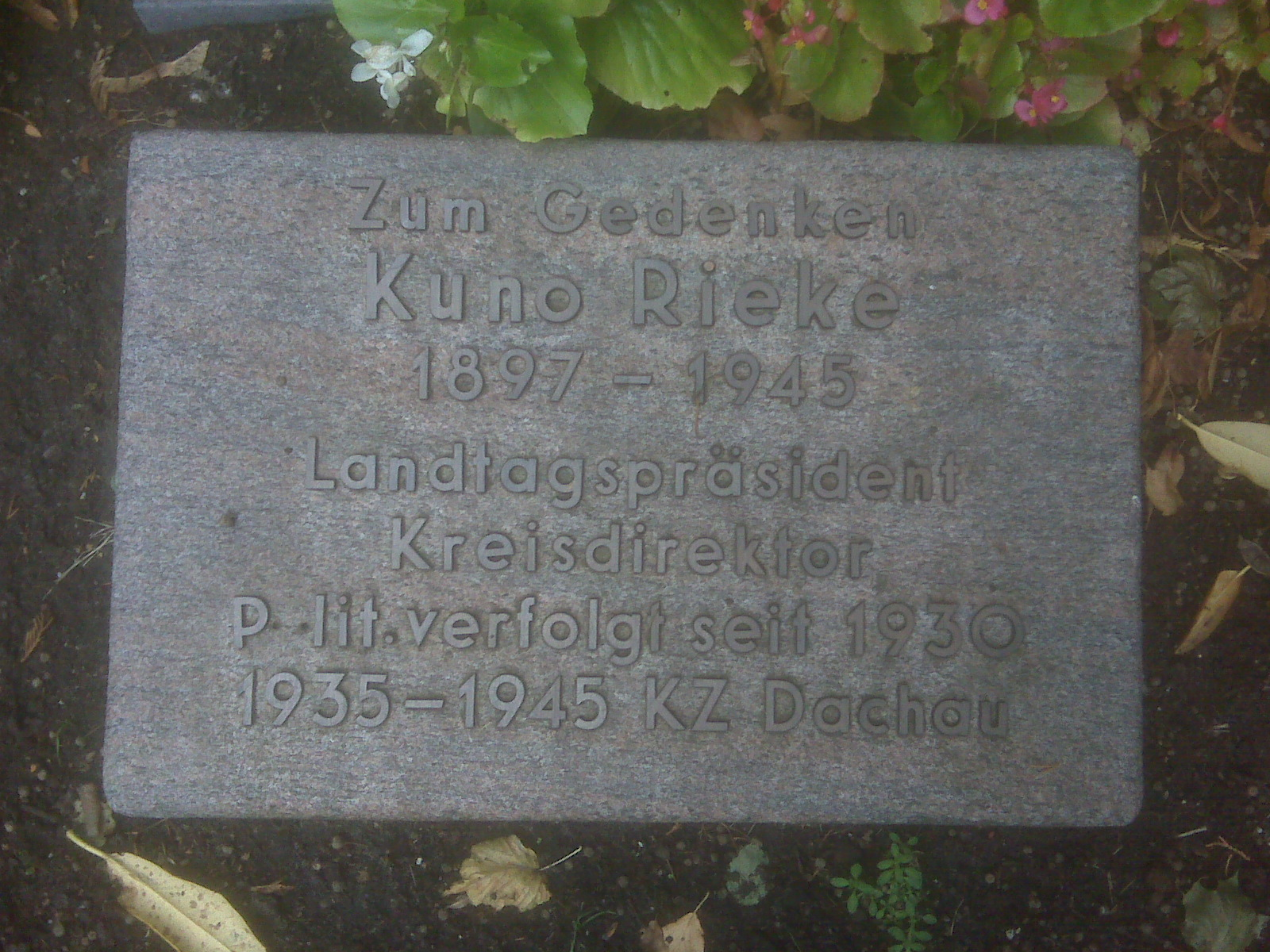 Politiker, Braunschweig, gestorben im KZ Dachau